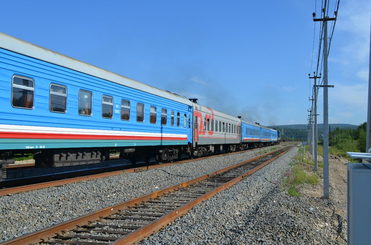 Поезд № 324 Нерюнгри - Томмот на разъезде Чульман, Нерюнгринский район, Якутия